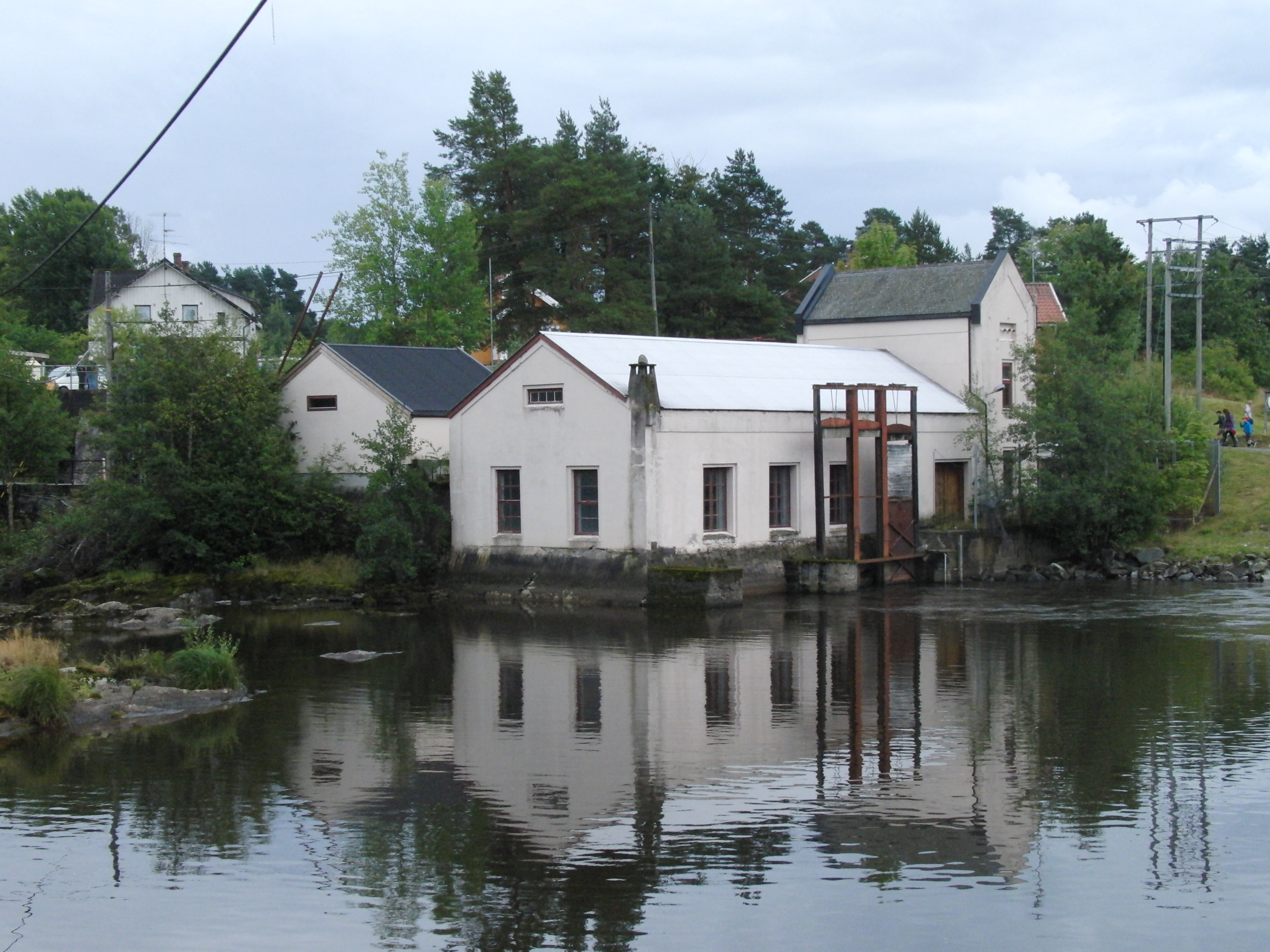 Strømsfoss kraftverk